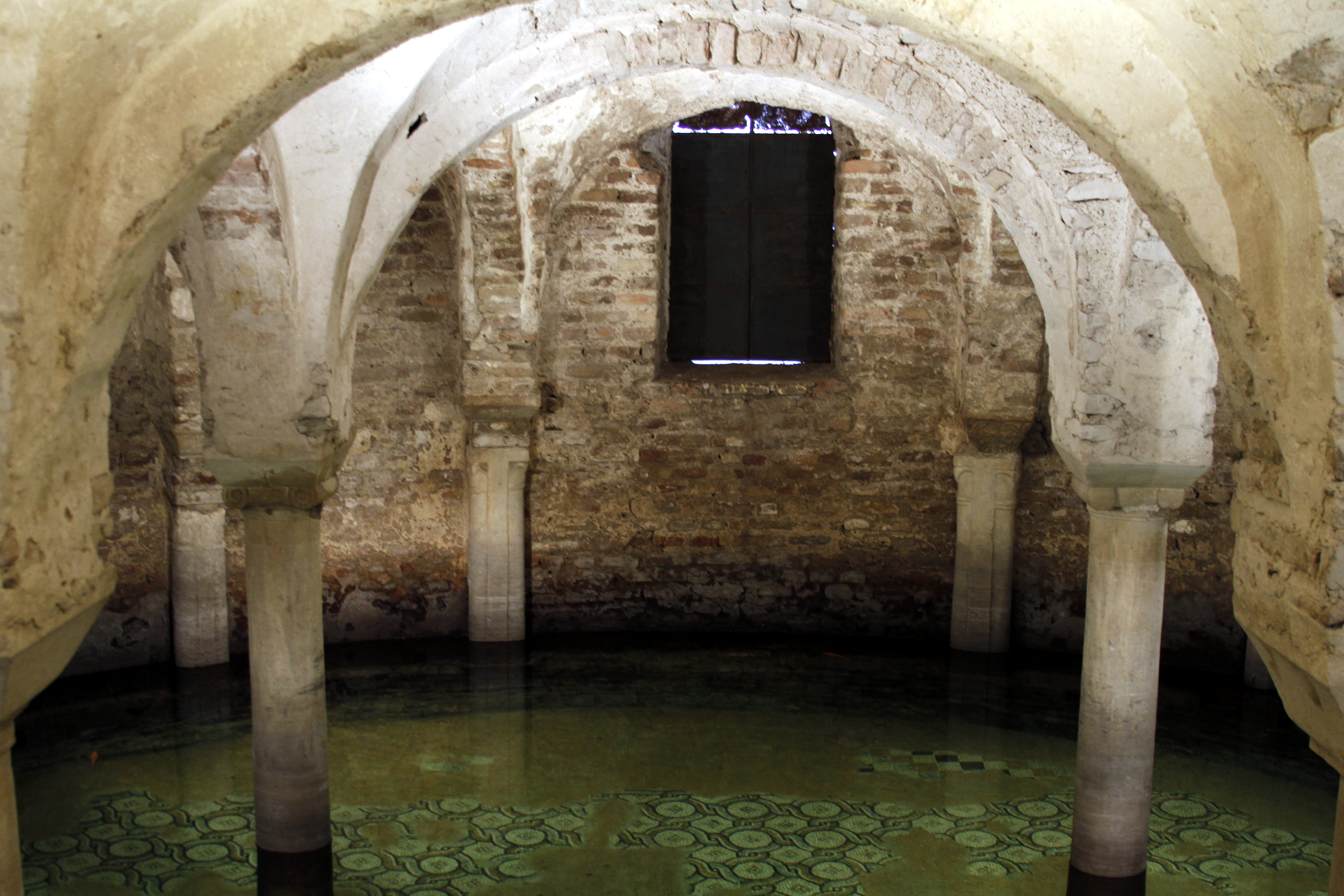 San Francesco - Ravenna